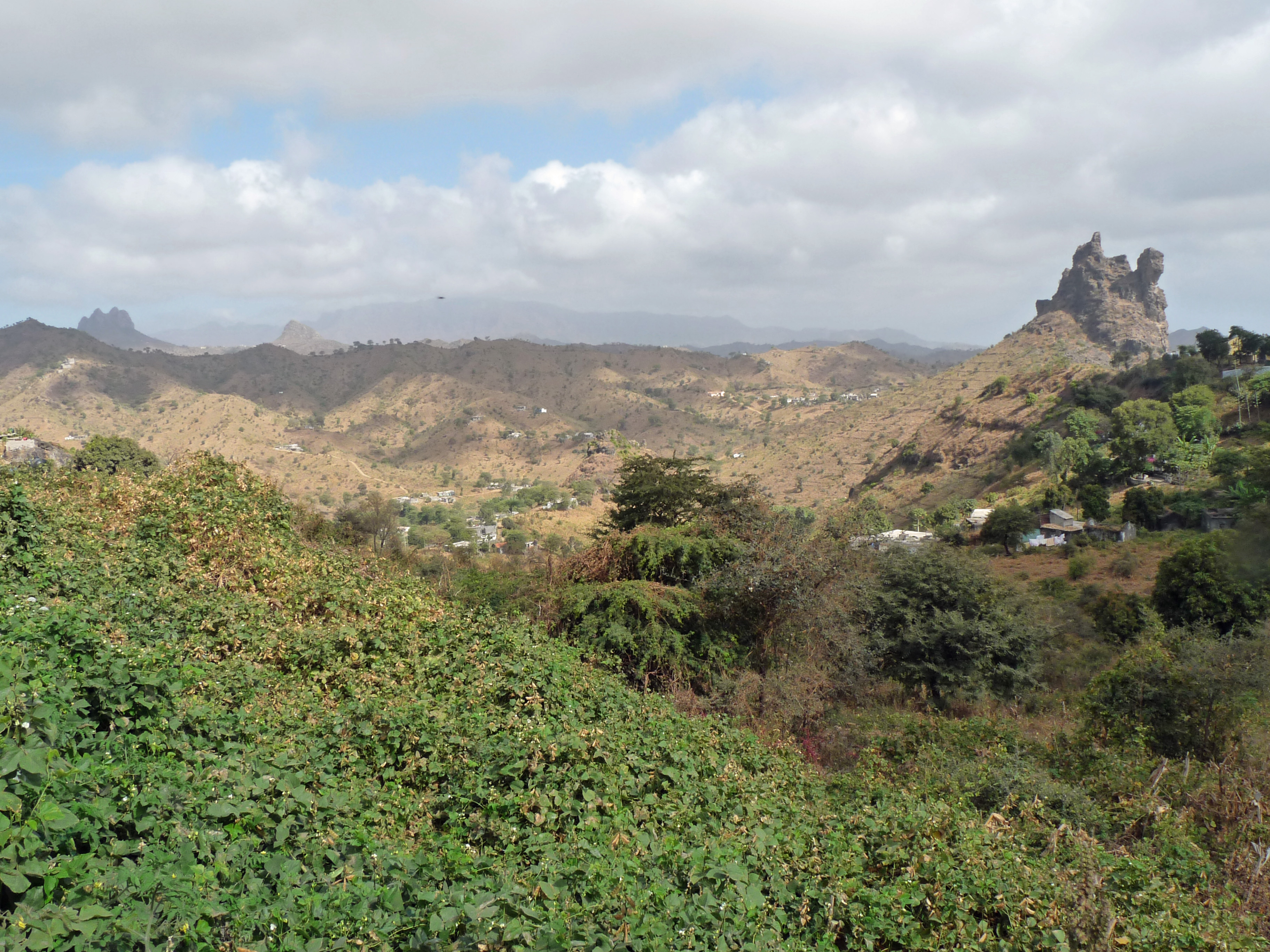 Picos (île de Santiago, Cap-Vert) : le rocher